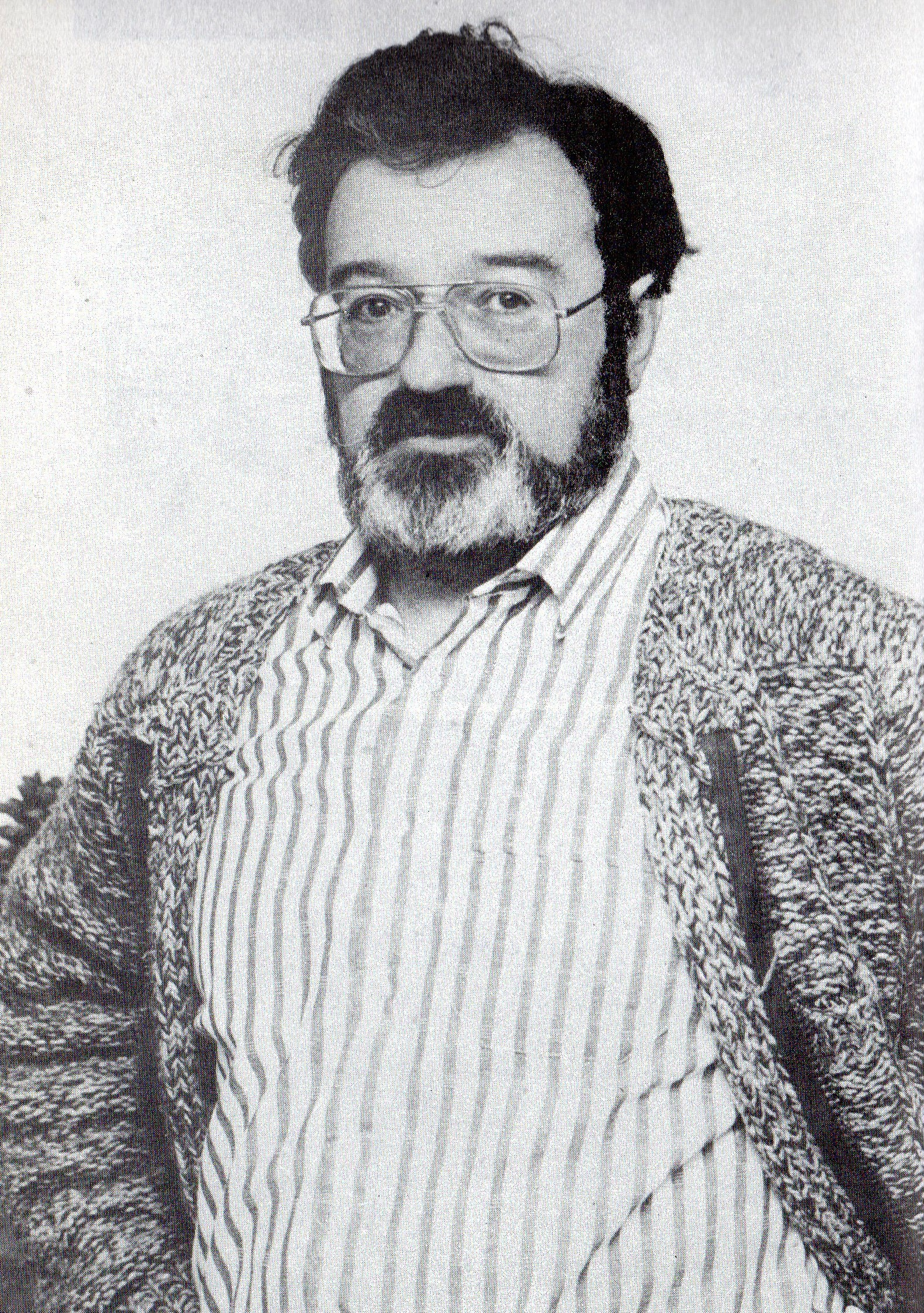 Filozof Leszek Nowak z UAM.